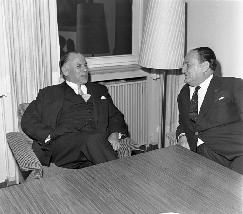 Empfang des peruanischen Regierungsmitglieds, Haya de la Torre, durch den Bundestagspräsidenten Dr. Gerstenmaier Haya de la Torre ist der Gründer der peruanischen Partei ARPA